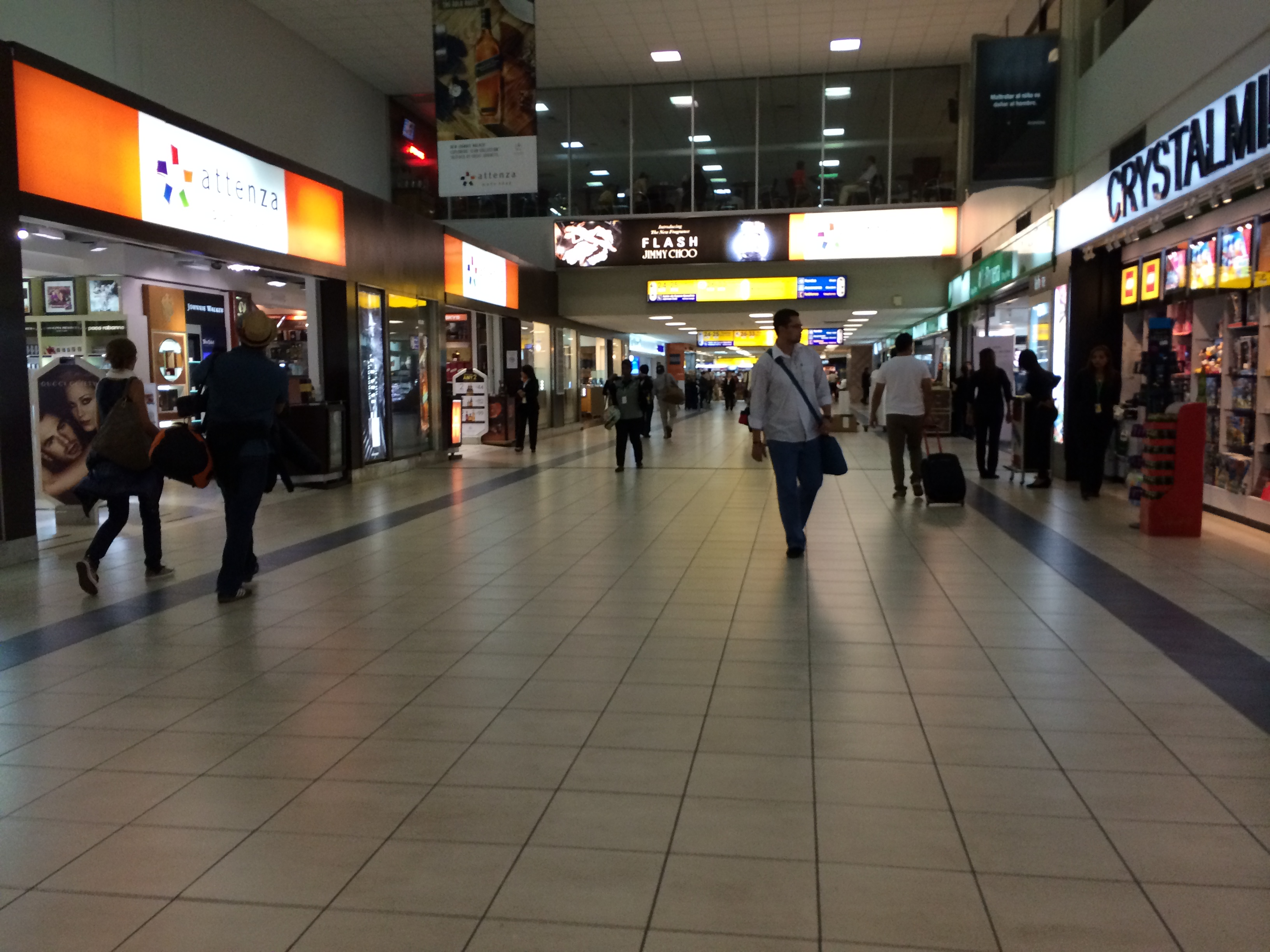 Interior del Aeropuerto Internacional de Panamá.